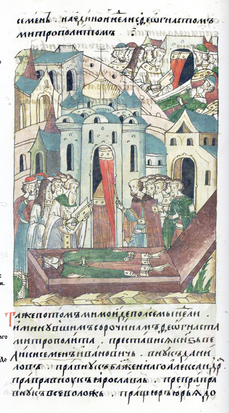 ЛИЦЕВОЙ ЛЕТОПИСНЫЙ СВОД Миновало семь недель и прошло сорок дней после смерти Феогноста митрополита, когда преставился великий князь Семен Иванович, внук Даниилов, правнук блаженного Александра, праправнук Ярославов, препраправнук Всеволодов, потомок пращура Юрия [Долгорукова, прапращура Владимира Мономаха, препрапращура Всеволода, Ярославича, Владимировича, месяца апреля в 26 день. И положен был в своей отчине на Москве в церкви святого архангела Михаила. Княжил 13 лет, и было всего ему 38 лет.]